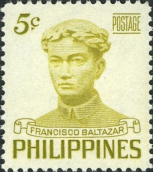 Francisco Balagtas